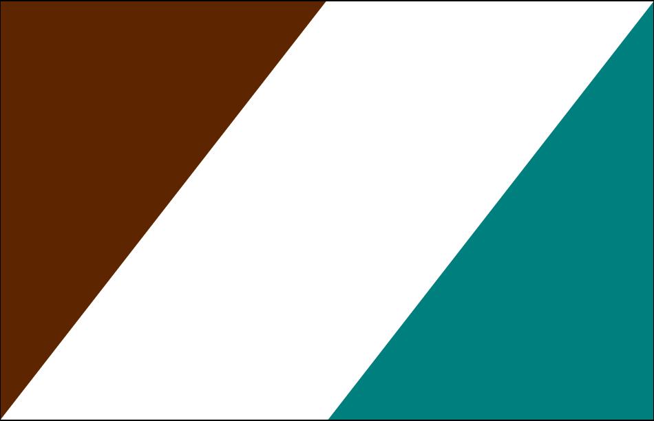 Bandera de Jama